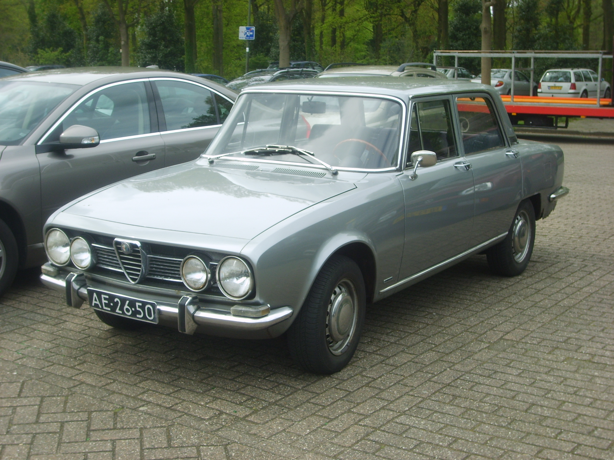 AE-26-50